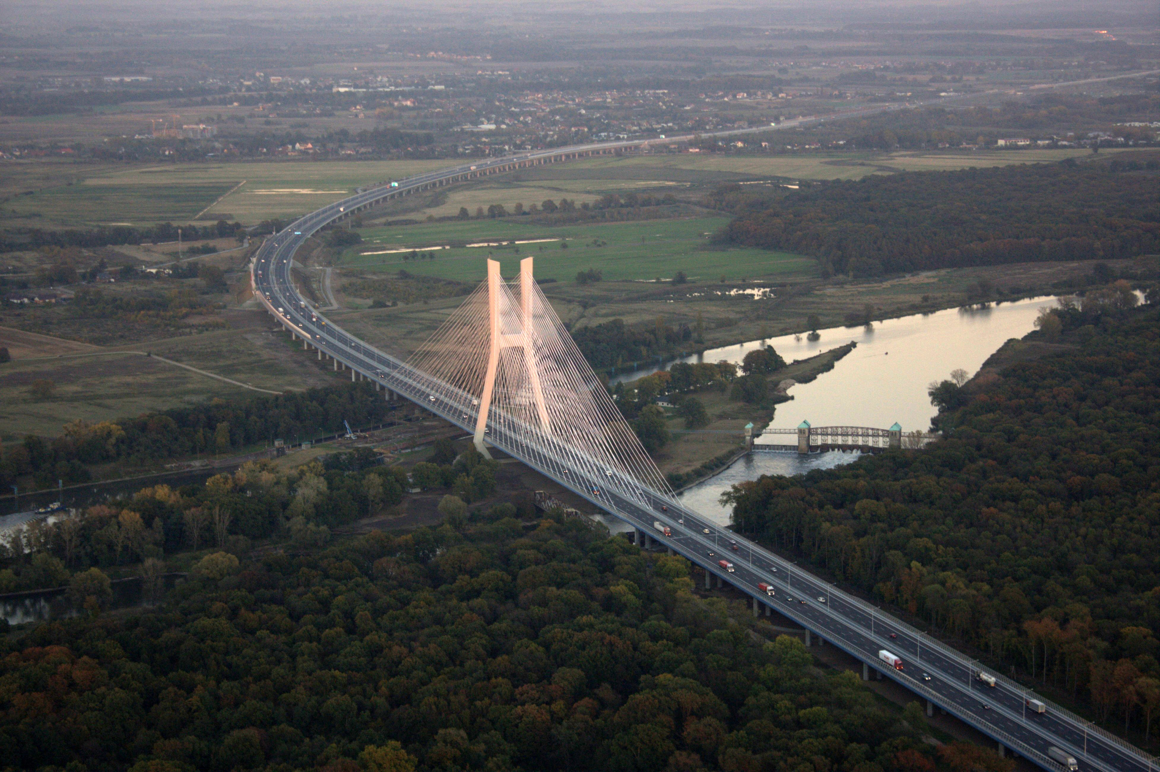 Most Redzinski z lotu ptaka